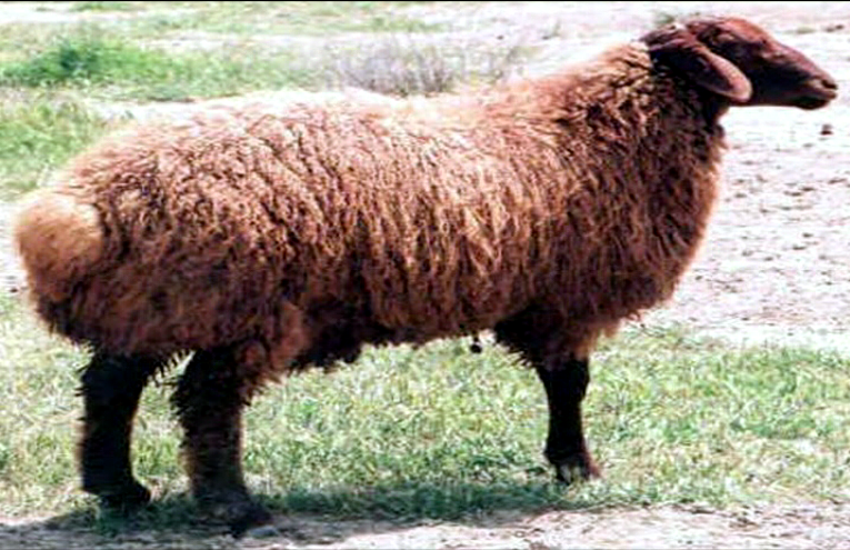 Abşeron heyvandarlıq təcrübə stansiyasınin aparıcı elmi işçisi, kənd-təsərüfatı elmləri namizədi Nəcəf Nəcəfov tərəfindən hazırlanmış materiallar əsasında aborigen cinslərin seleksiyasından alınmış Abşeron qoyunu